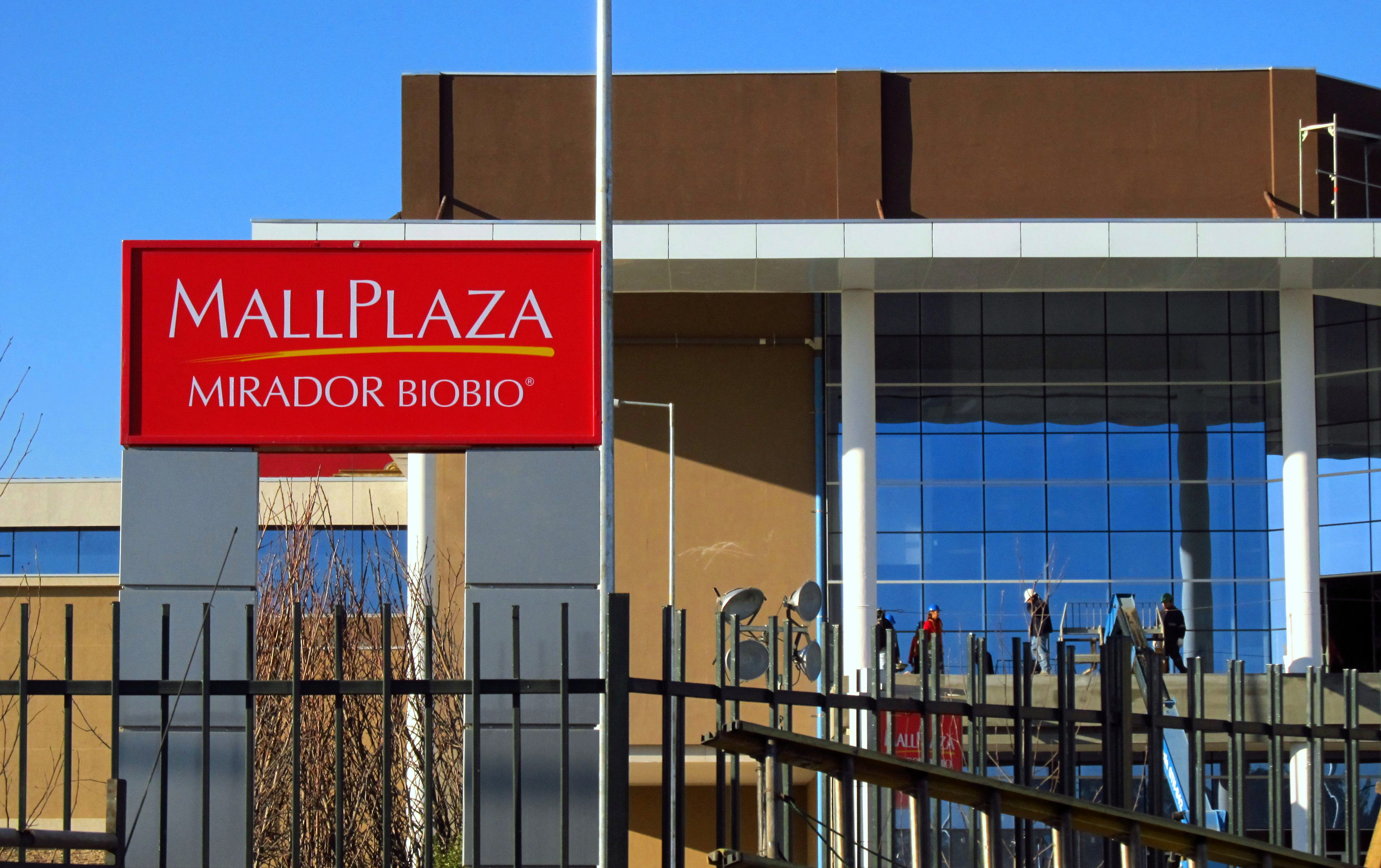 Entrada y letrero de Mall Plaza Mirador Biobío, Concepción (Chile).